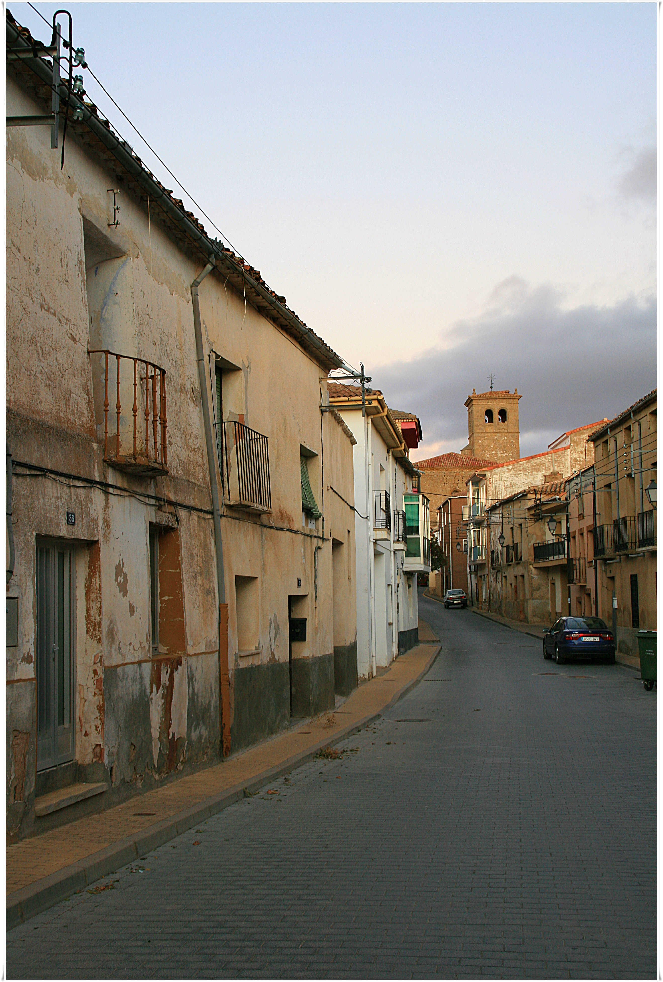 Calle Mayor.Gomara.Soria.